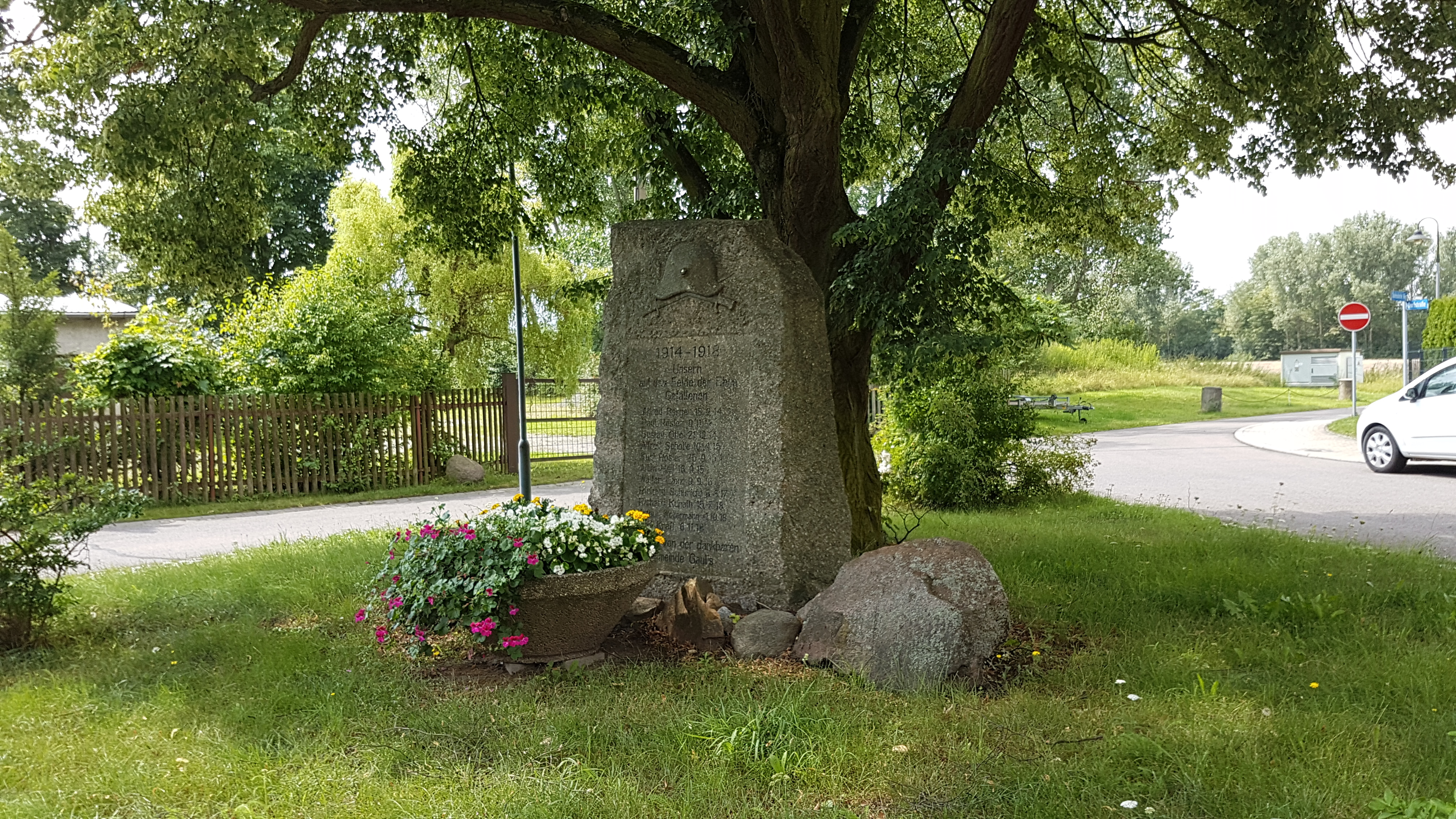 Bild von dem Gefallenendenkmal in Gaulis.